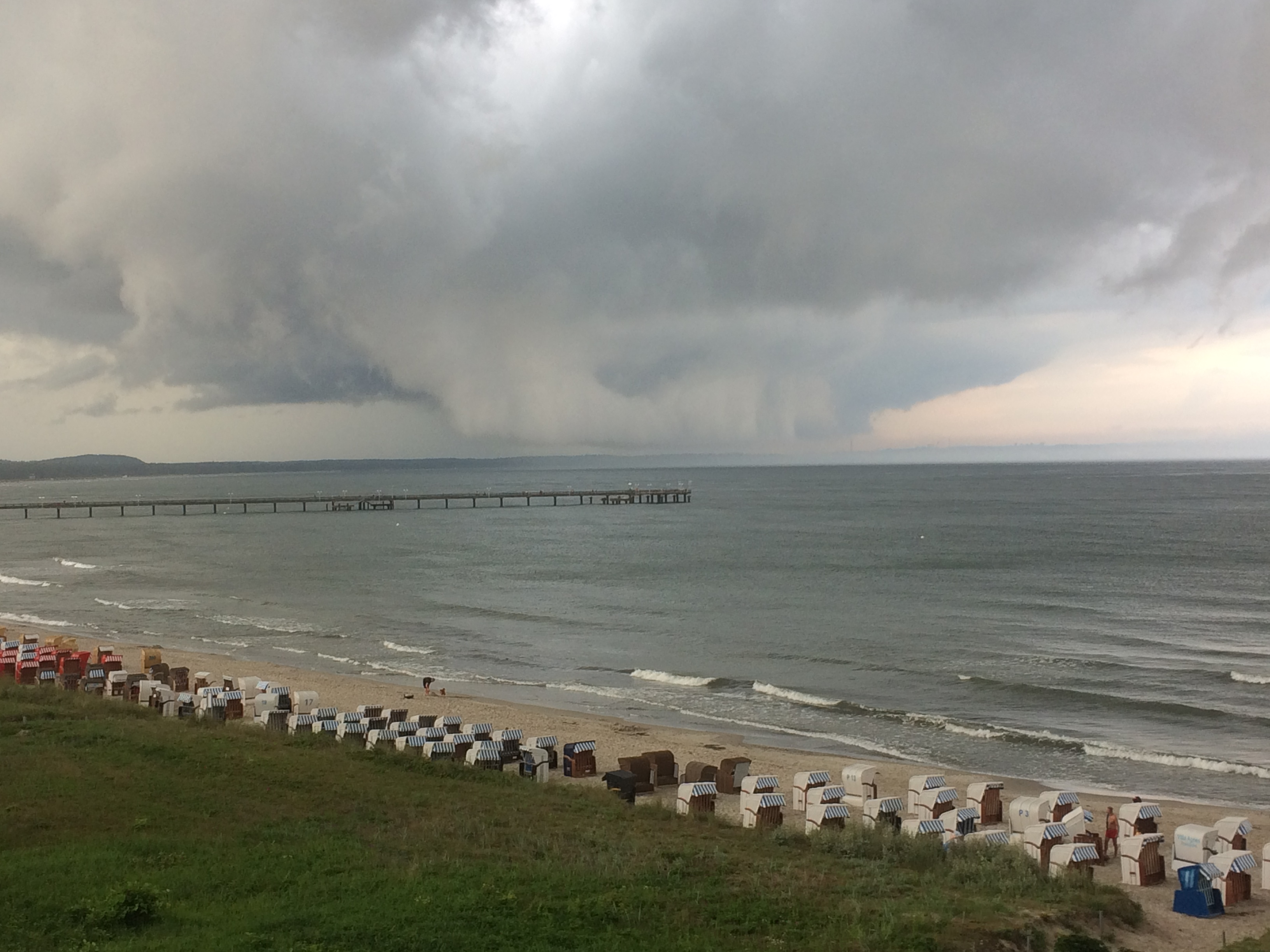 Strand und Strandkörbe bei aufziehender Regenfront in Binz